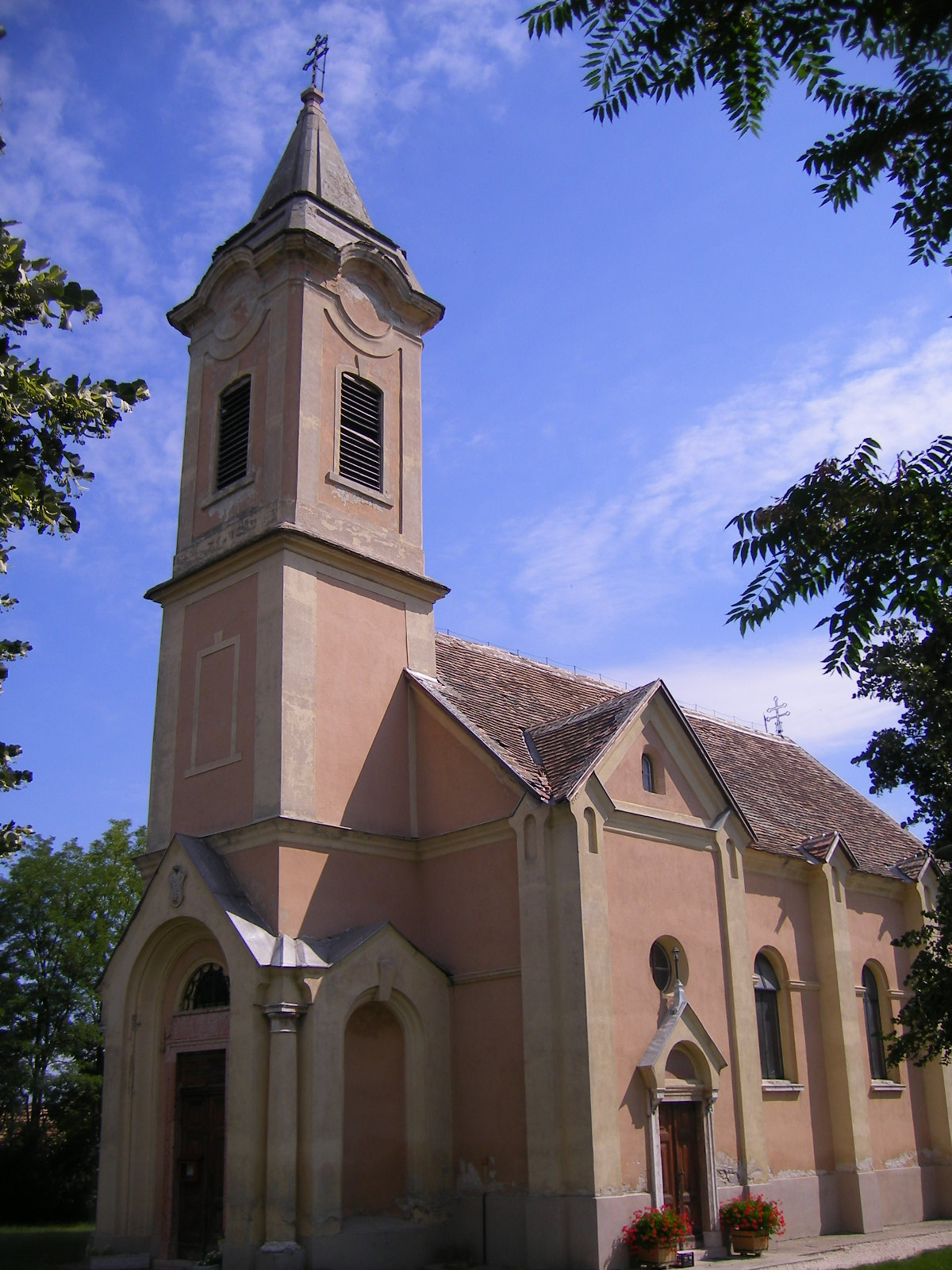 Kocs - Szentháromság római katolikus templom